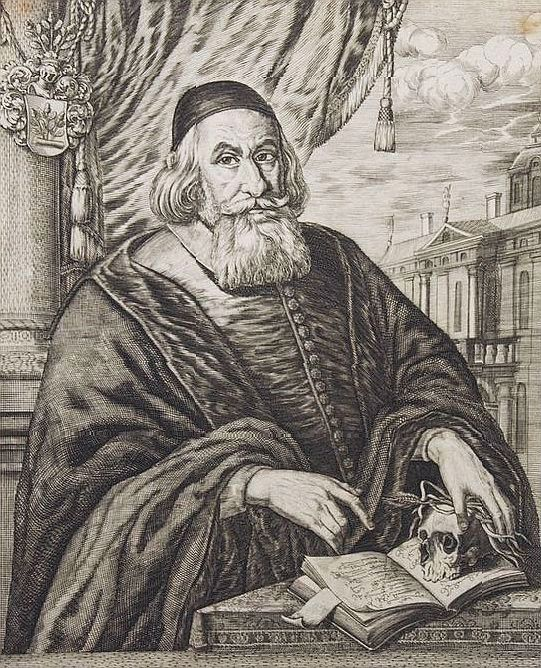 Jan Jerzy Schwabe - miedzioryt Johanna Bensheimera z 1661 roku.